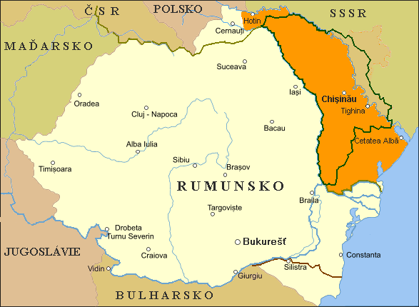 Besarábie v rámci Velkého Rumunska.